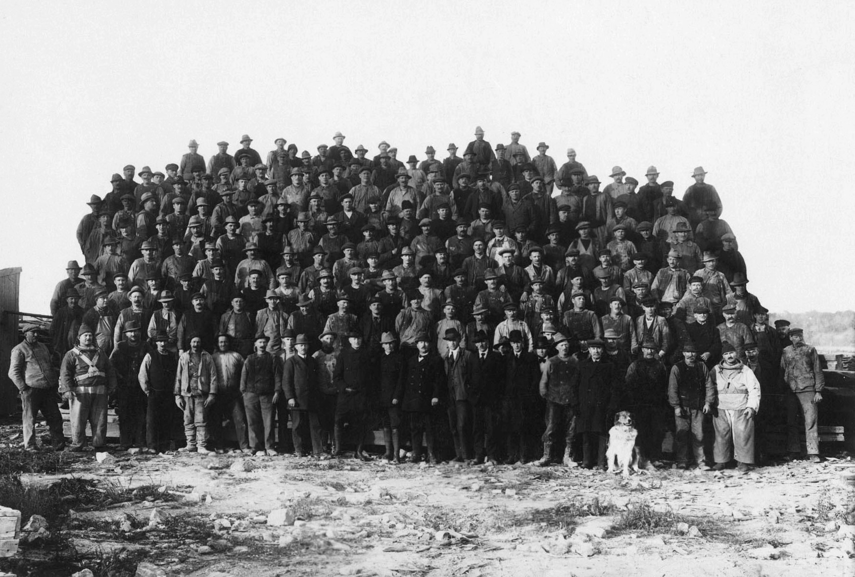 Frihamnen: Gruppbild av arbetsstyrkan